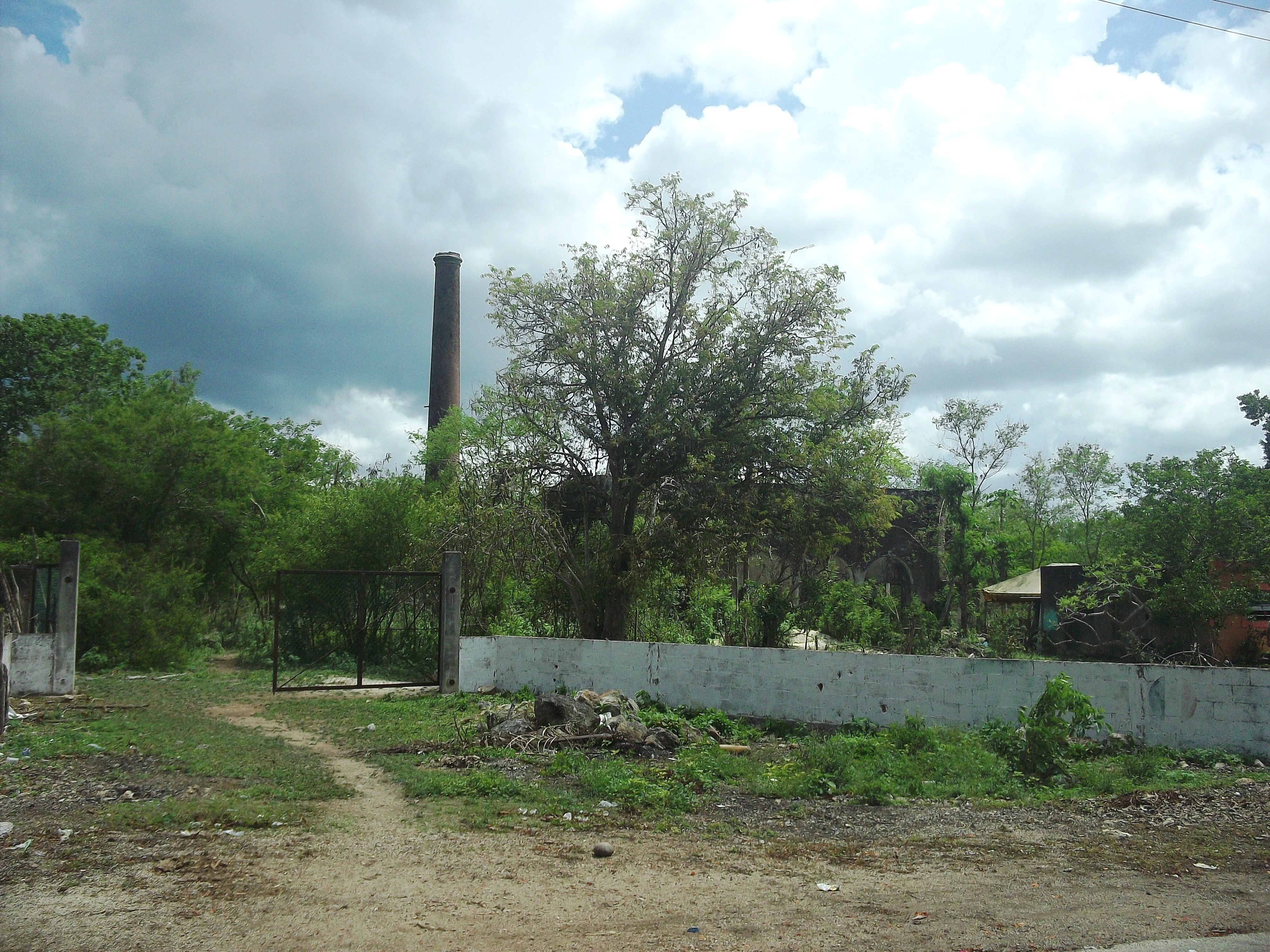 Hacienda de San Bernardino (Seyé), Yucatán.